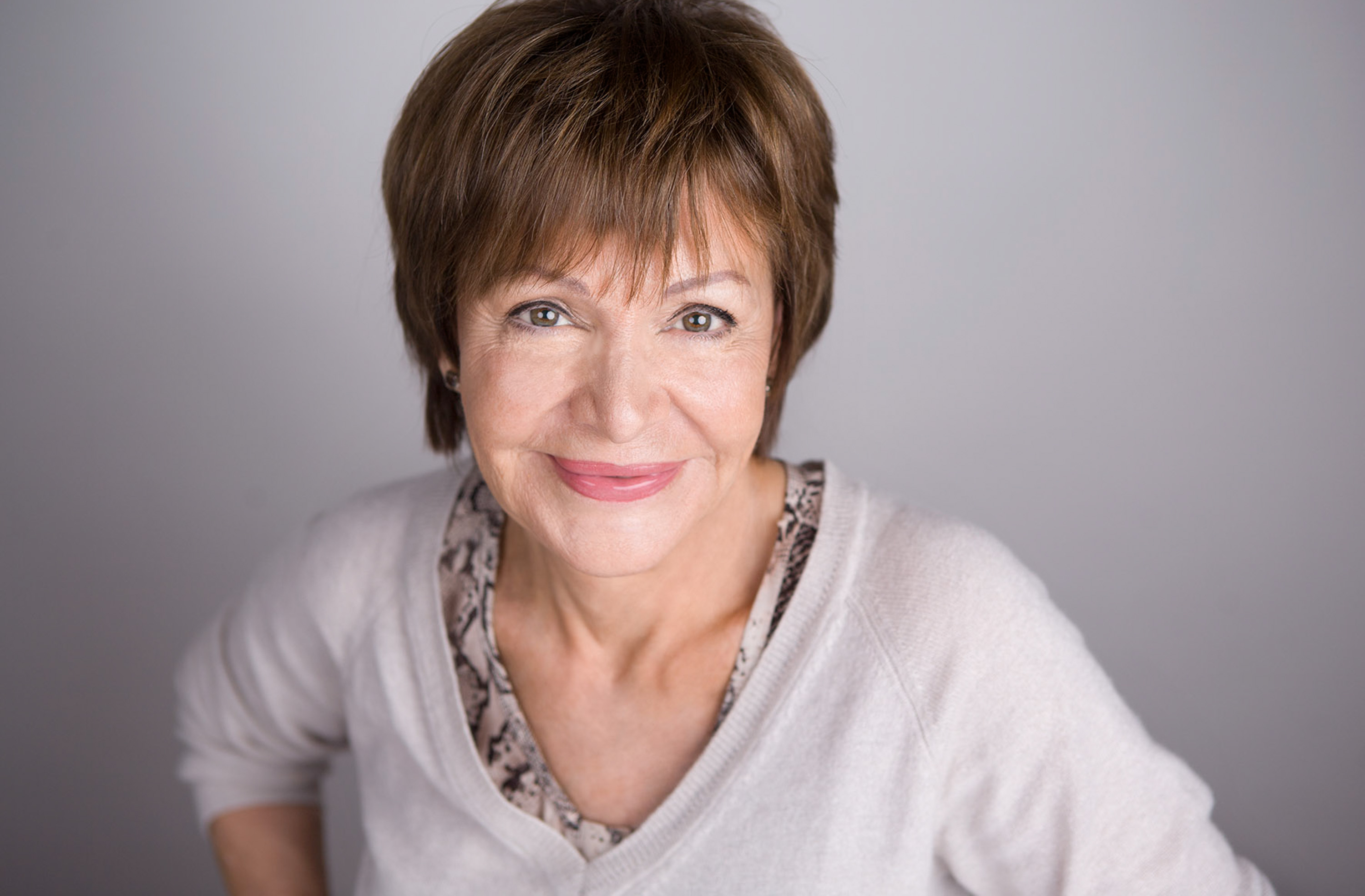 Portrait der Autorin und Fotografin Rosemarie Zens